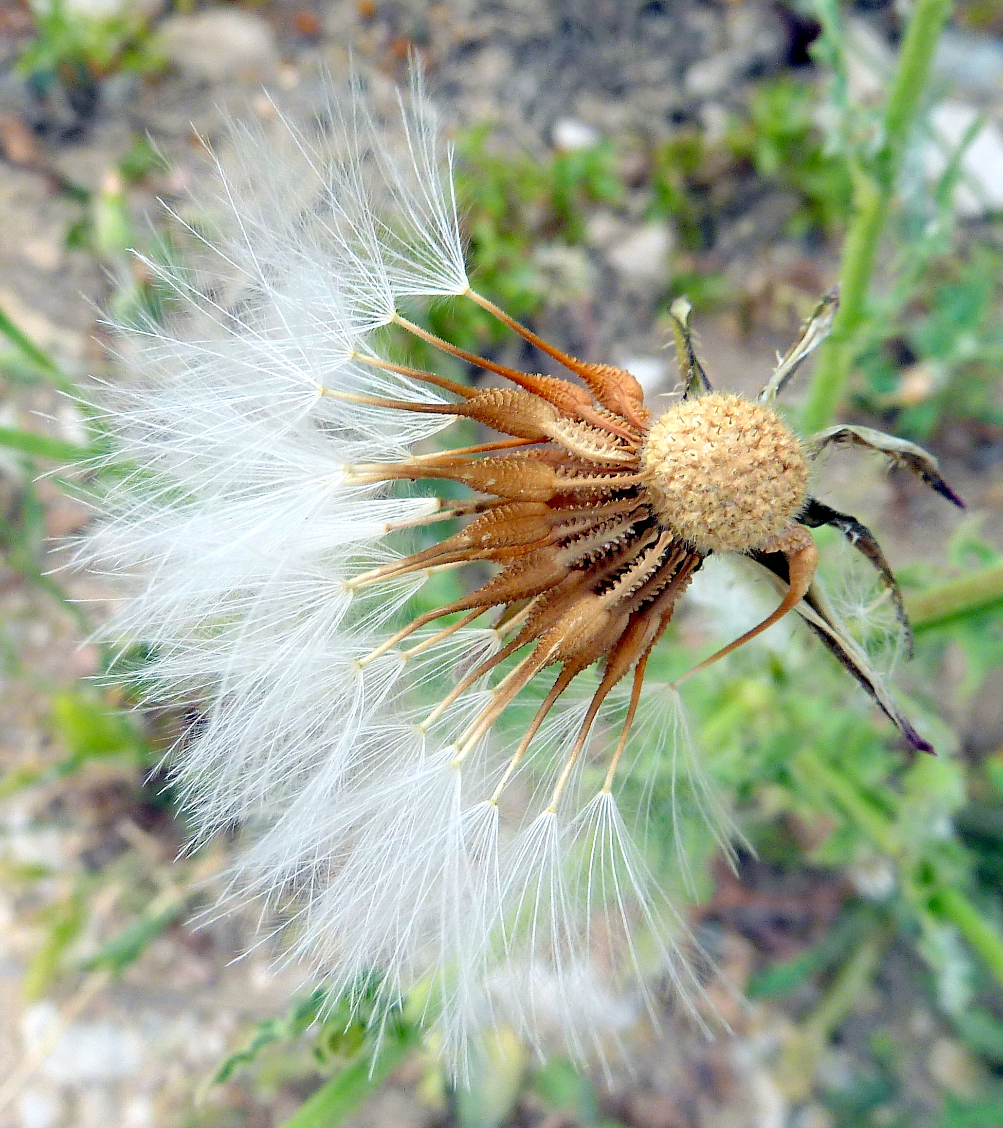 Urospermum picroides - Receptáculo tuberculado-viloso y cipselas con el cuerpo muy ornamentado y su vilano plumoso. - «Lo Gallego», Albatera, Alicante (España)